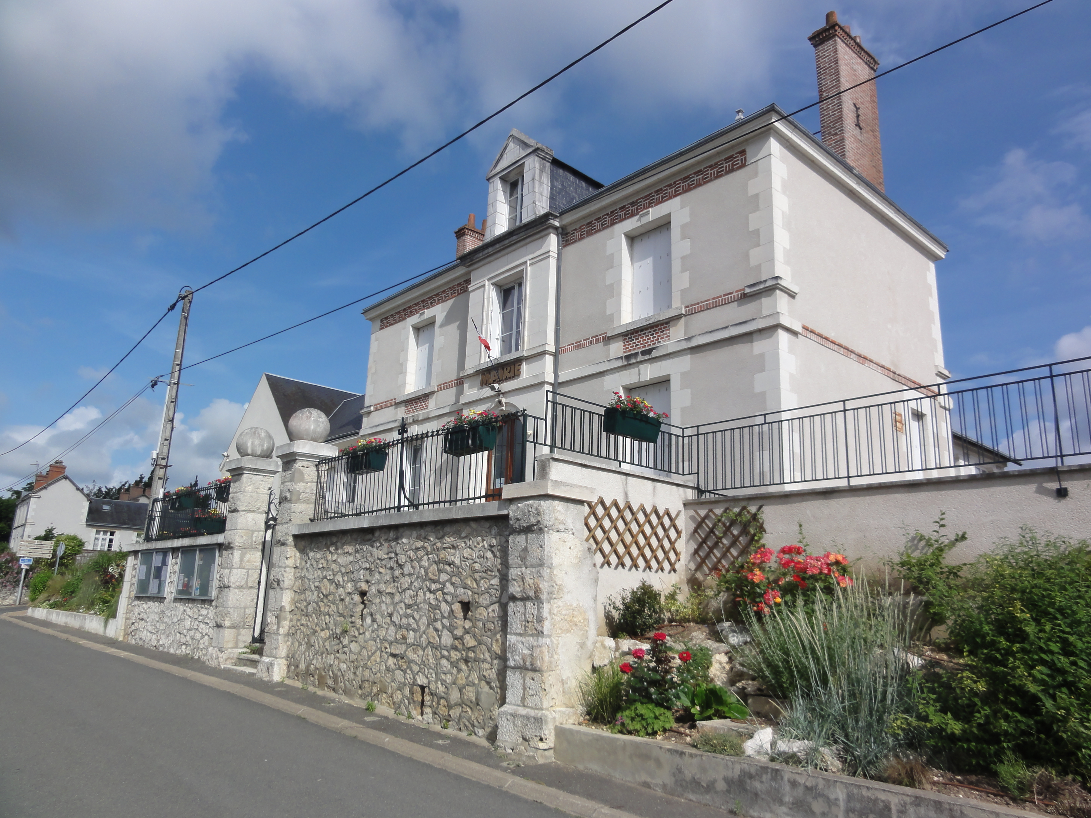 Candé-sur-Beuvron (Loir-et-Cher) Mairie